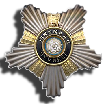 Suomen Valkoisen Ruusun ritarikunnan suurristin rintatähti.